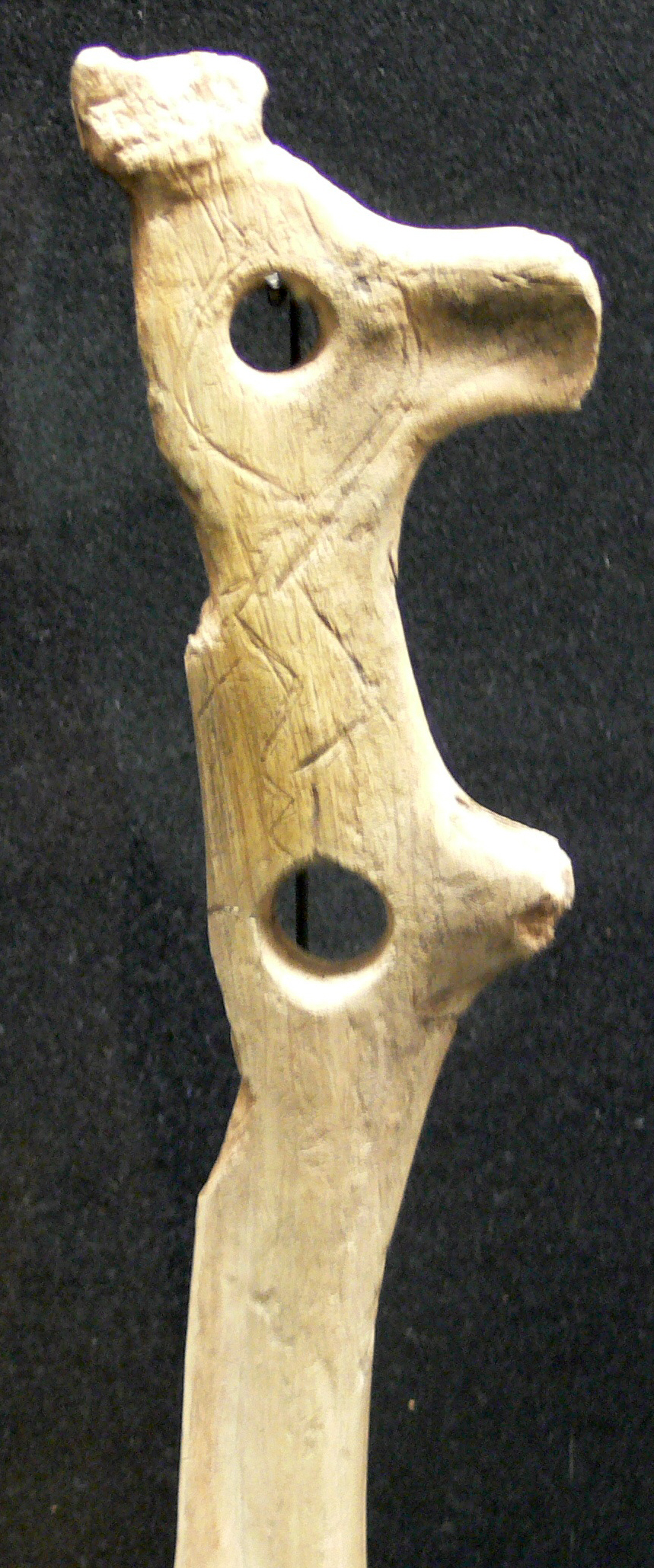 Schaffhausen, Museum zu Allerheiligen, Dauerausstellung zur regionalen Archäologie (vor der Neuaufstellung) Doppellochstab mit späteiszeitlicher Gravierung vom Kesslerloch